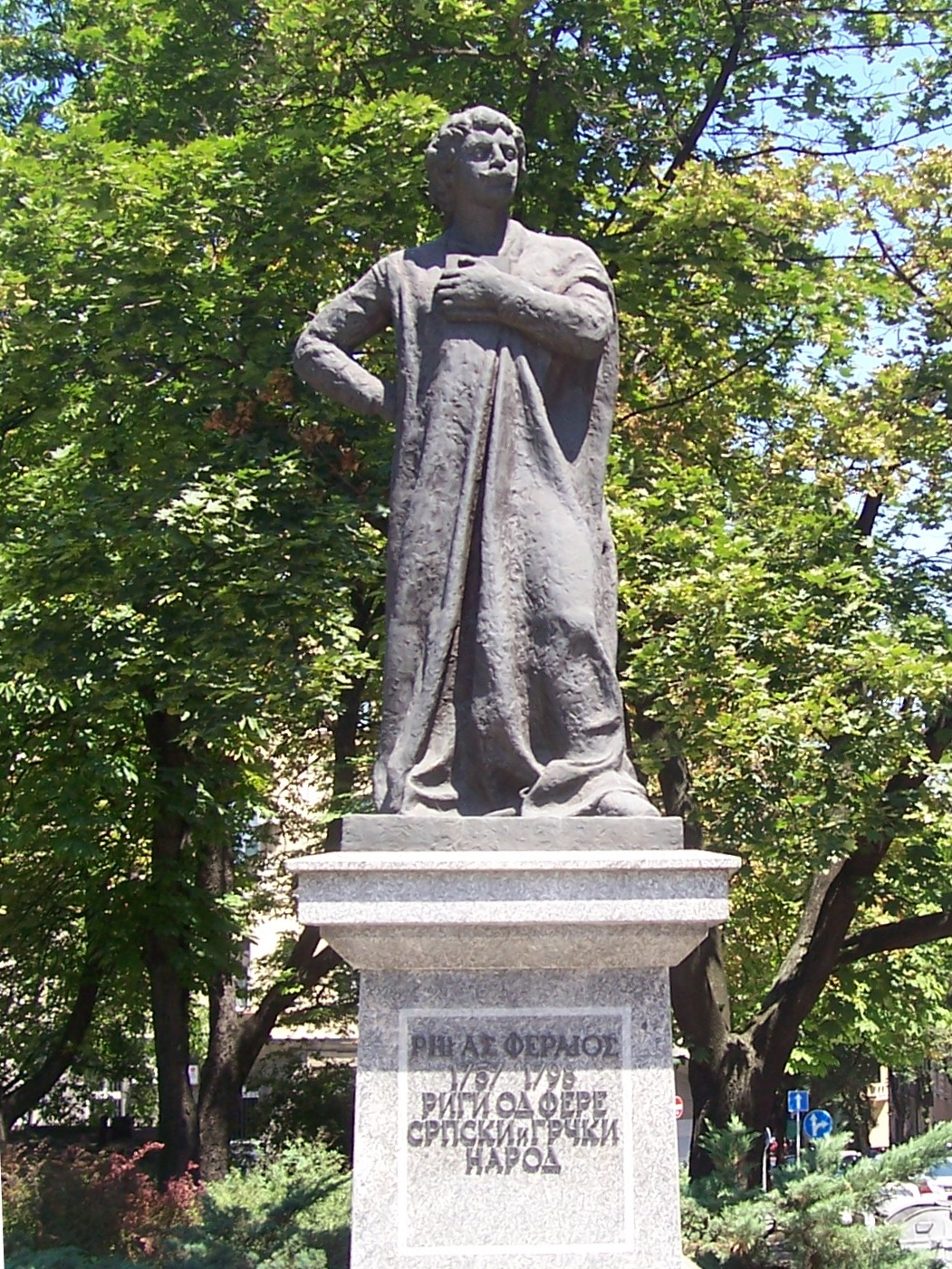 Памятник греческому революционеру Ригасу Велистинлису